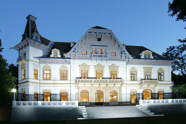 Springer Schlößl (Vorderansicht)